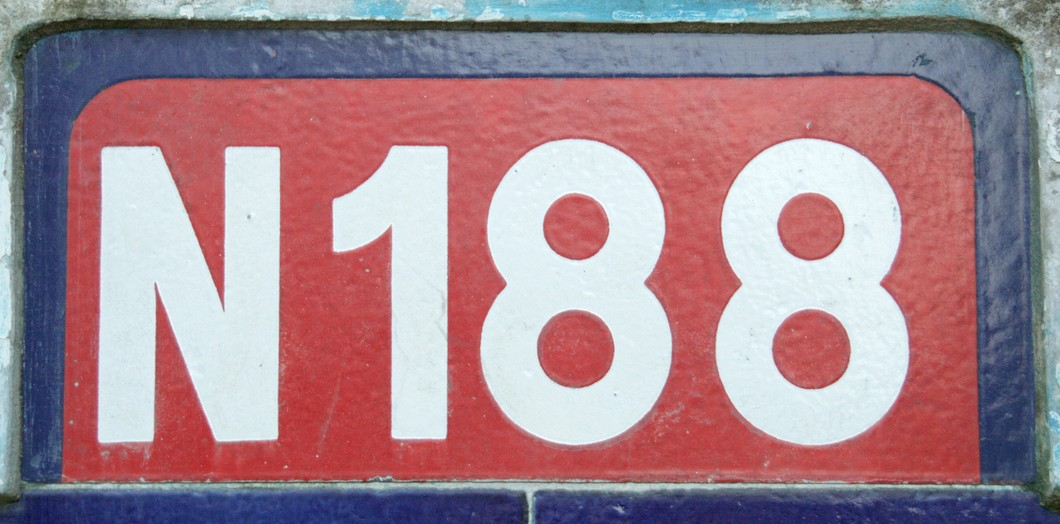 Cartouche de panneau Michelin de la N188